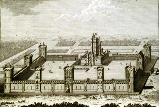 Vue du château de Vincennes sous Charles V (XIVe siècle) par Pierre Nicolas Ransonette (1745-1810), graveur ordinaire de Monsieur.